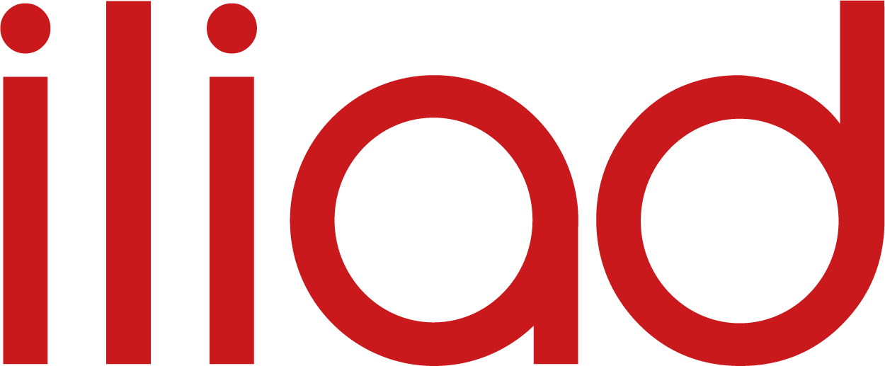 Logo Iliad